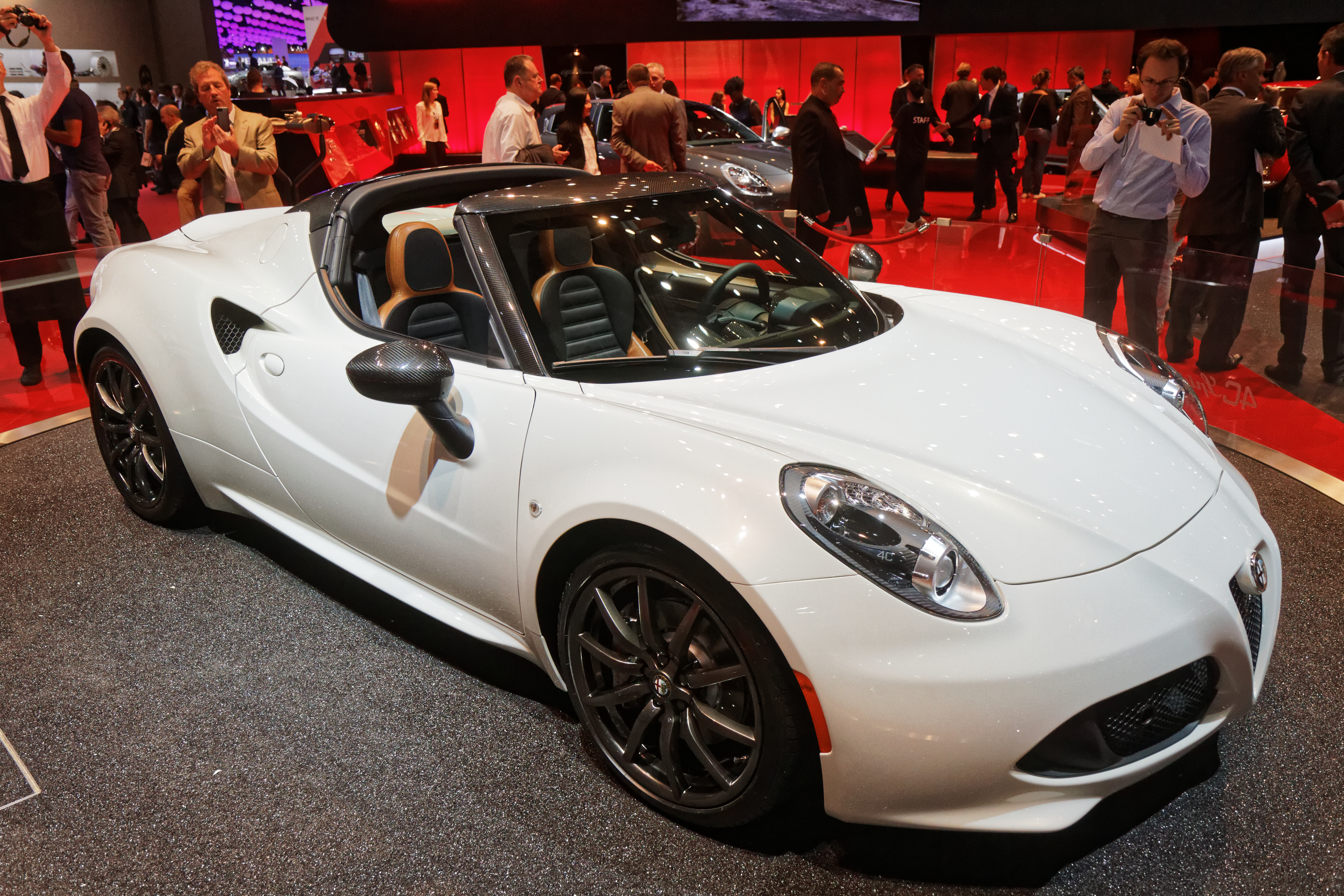 Une Alfa Romeo 4C Spider présentée lors du mondial de l'automobile de Paris 2014.